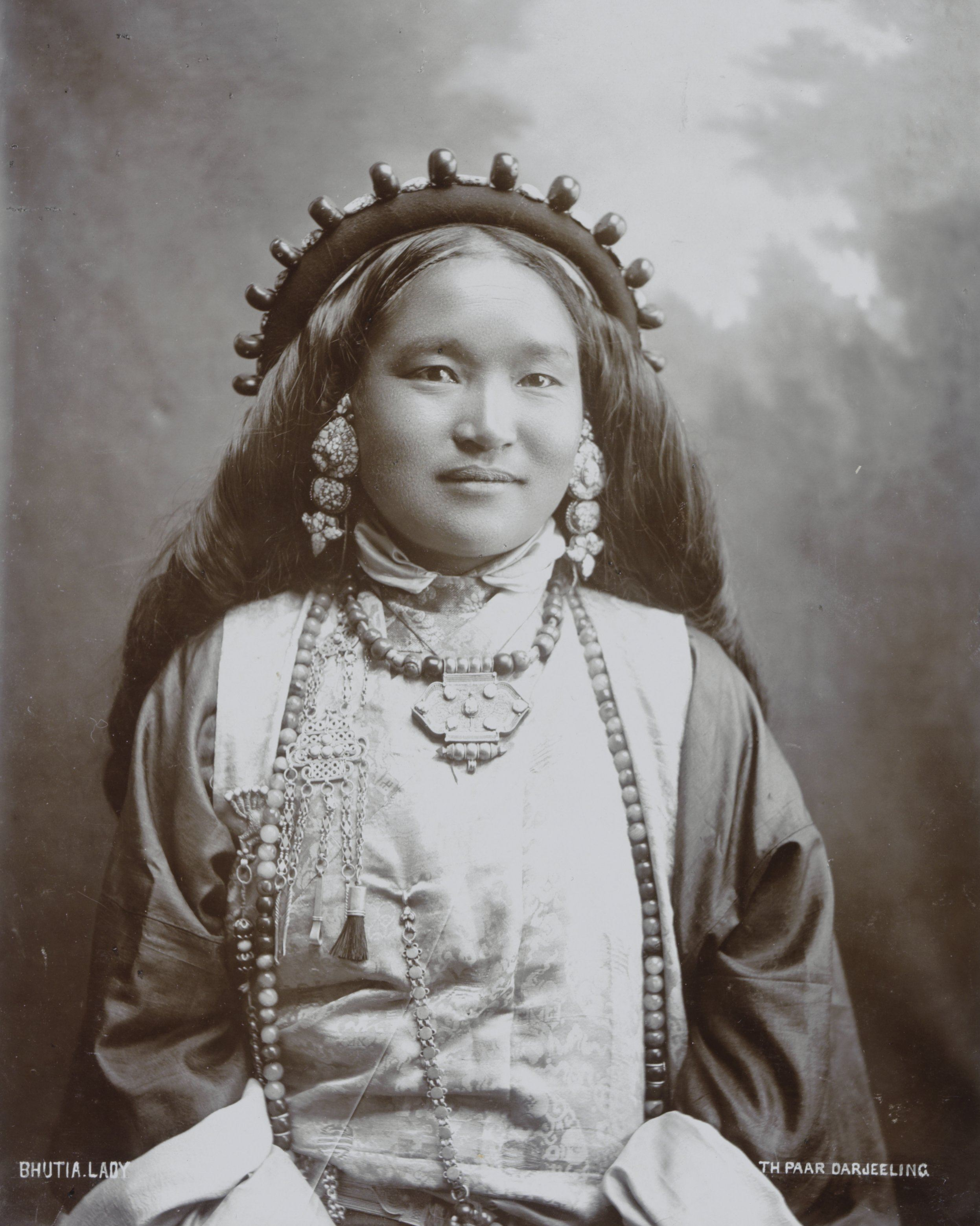 IdentificatieTitel(s): Bhutiase vrouwBhutia Lady (titel op object)Objecttype: foto Objectnummer: RP-F-00-5347-4AOpschriften / Merken: annotatie, verso linksboven, handgeschreven op karton met pen in zwarte inkt: ‘4a Tibettanen.’VervaardigingVervaardiger: fotograaf: Theodor Paar (vermeld op object)Plaats vervaardiging: DarjilingDatering: ca. 1895 - ca. 1915Fysieke kenmerken: daglichtcollodiumzilverdrukMateriaal: papier karton Techniek: daglichtcollodiumzilverdrukAfmetingen: foto: h 202 mm × b 152 mmblad: h 244 mm × b 164 mmOnderwerpWaar: DarjilingVerwerving en rechtenCredit line: Schenking van J.C.P. Bierens de HaanVerwerving: schenkingCopyright: Publiek domein